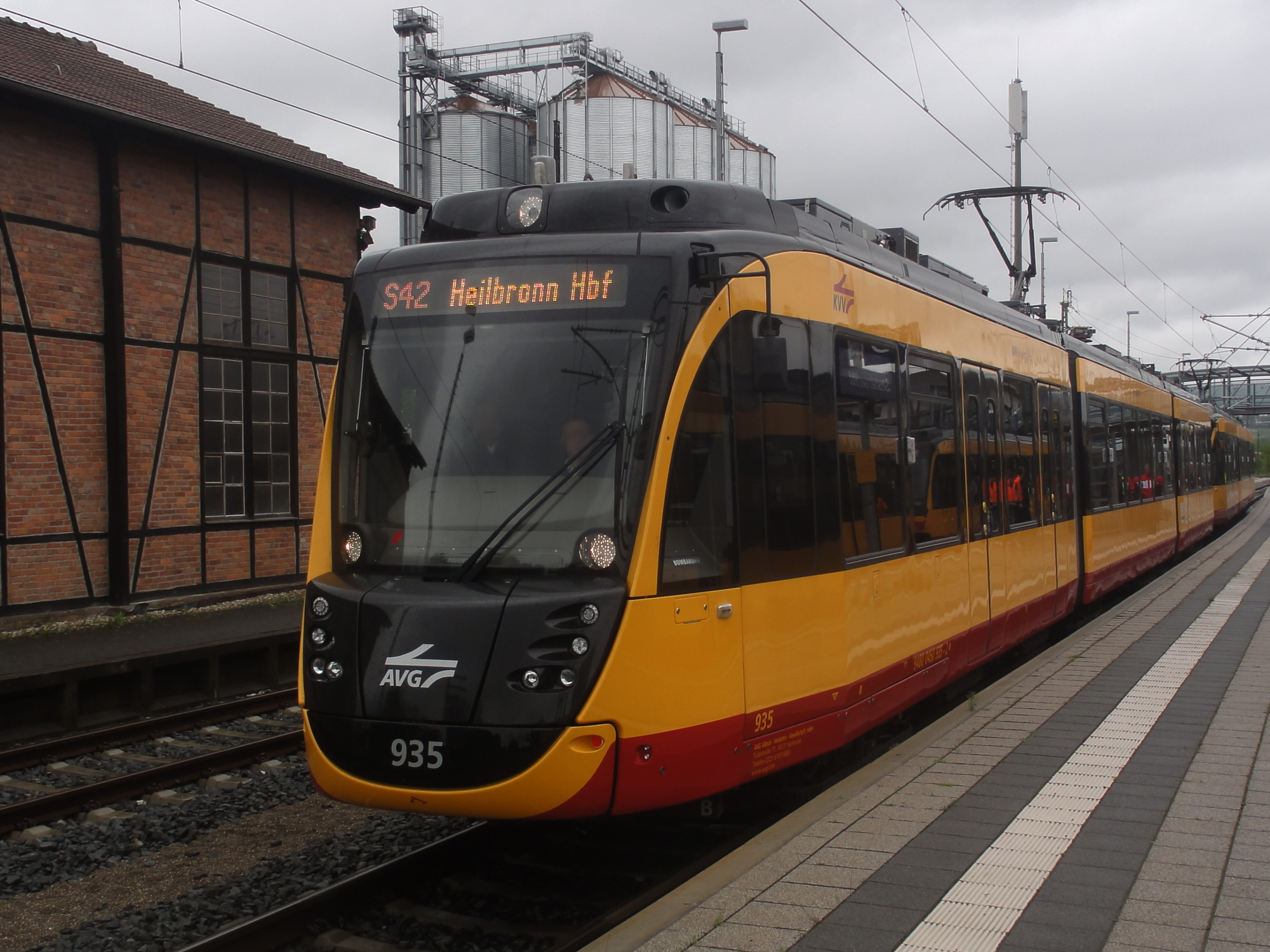 ET2010 935 steht in Sinsheim am Bahnsteig.